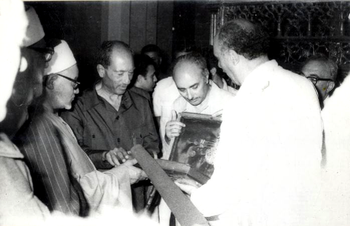 زيارة الرئيس محمد أنور السادات لمدينة دسوق.